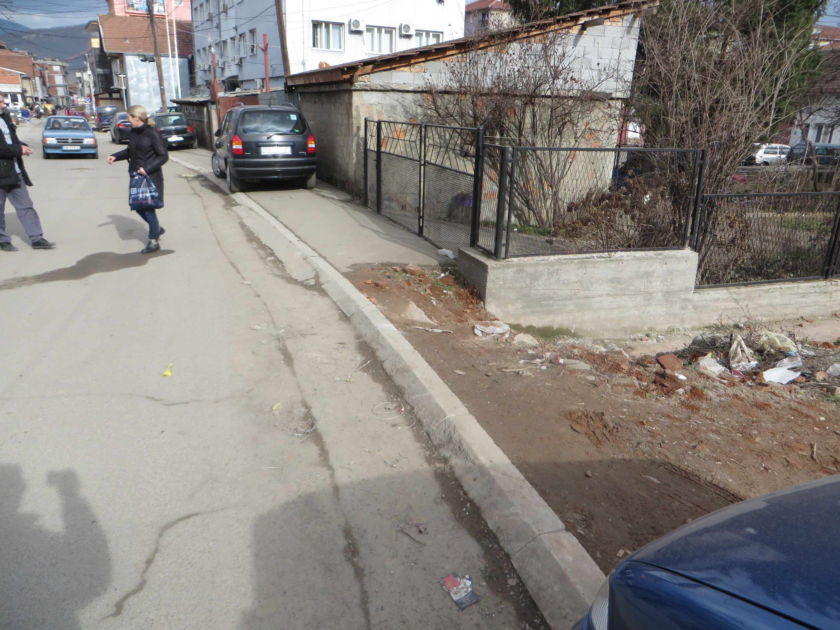 Lagja e Boshnjakëve, Mitrovicë, Kosovo